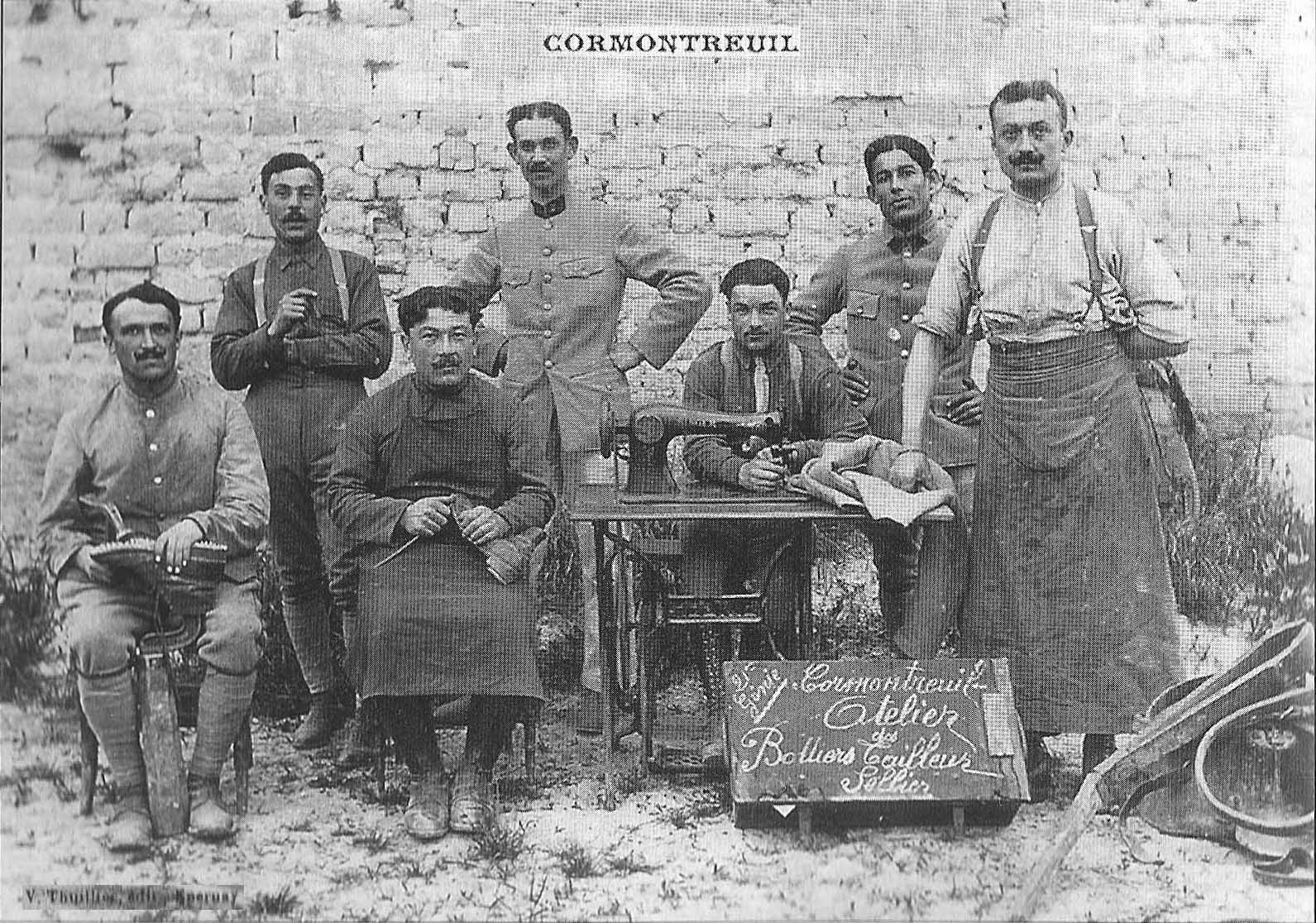 21e_génie_à_Cormontreuil.